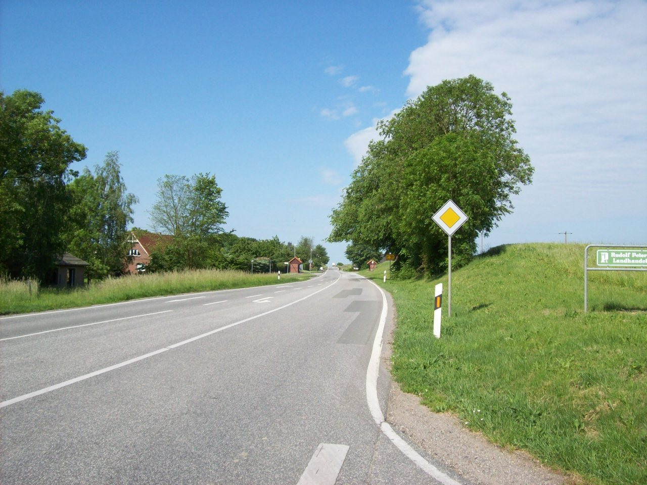 Landstraße duch Vimfow aus Richtung Goldberg nach Mestlin weiter nach Crivitz oder Parchim